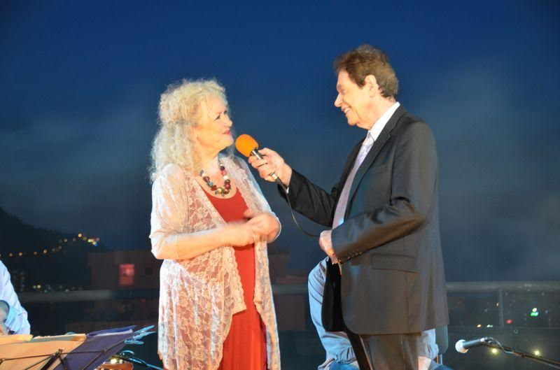 Arye Yass